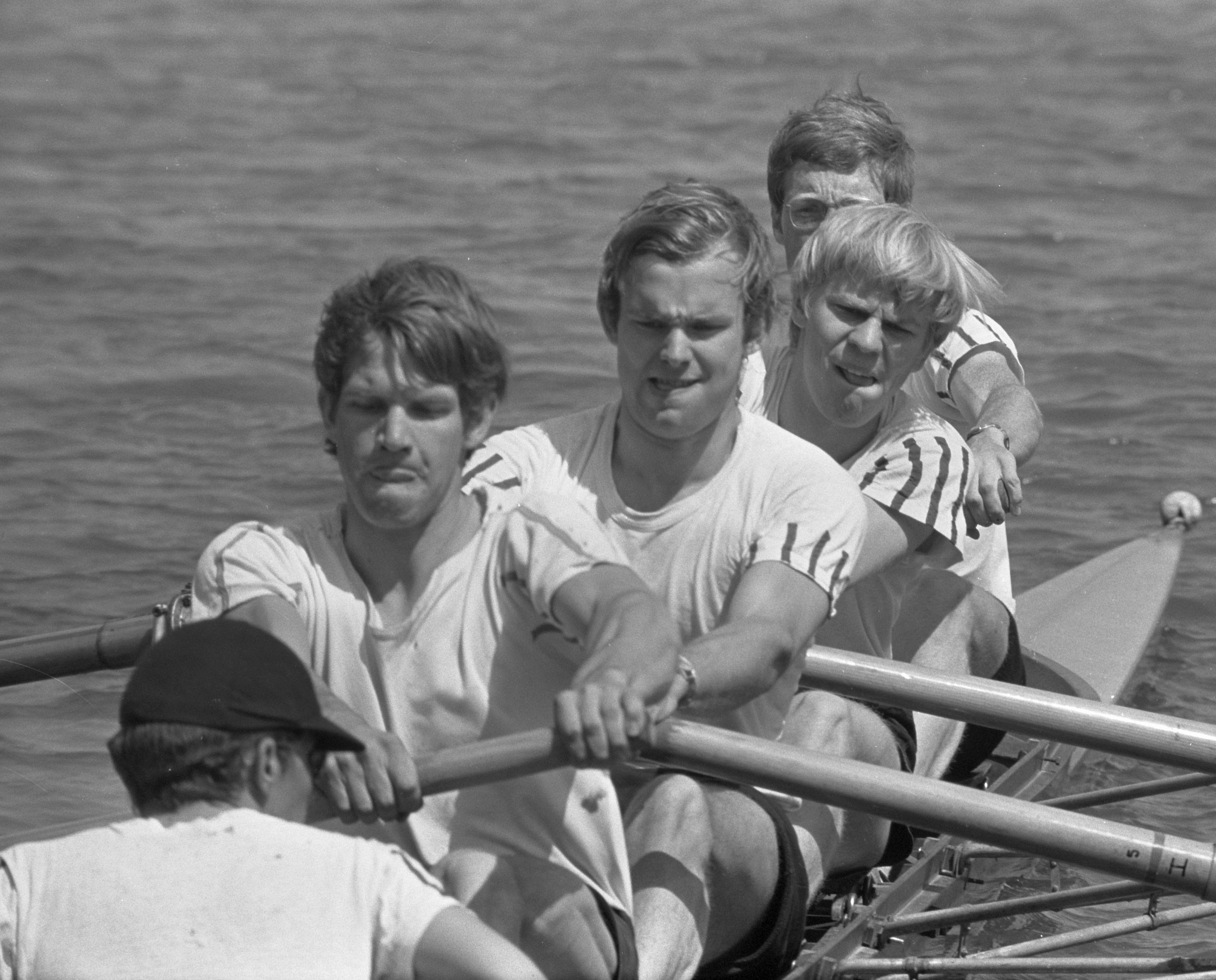 Nationale Roeiwedstrijden op Bosbaan finale elite 4 me stuurman, Nereus 4 in aktie, van onder naar boven stuur Koning, v. Enst , Reesink, Constandse, Venemans